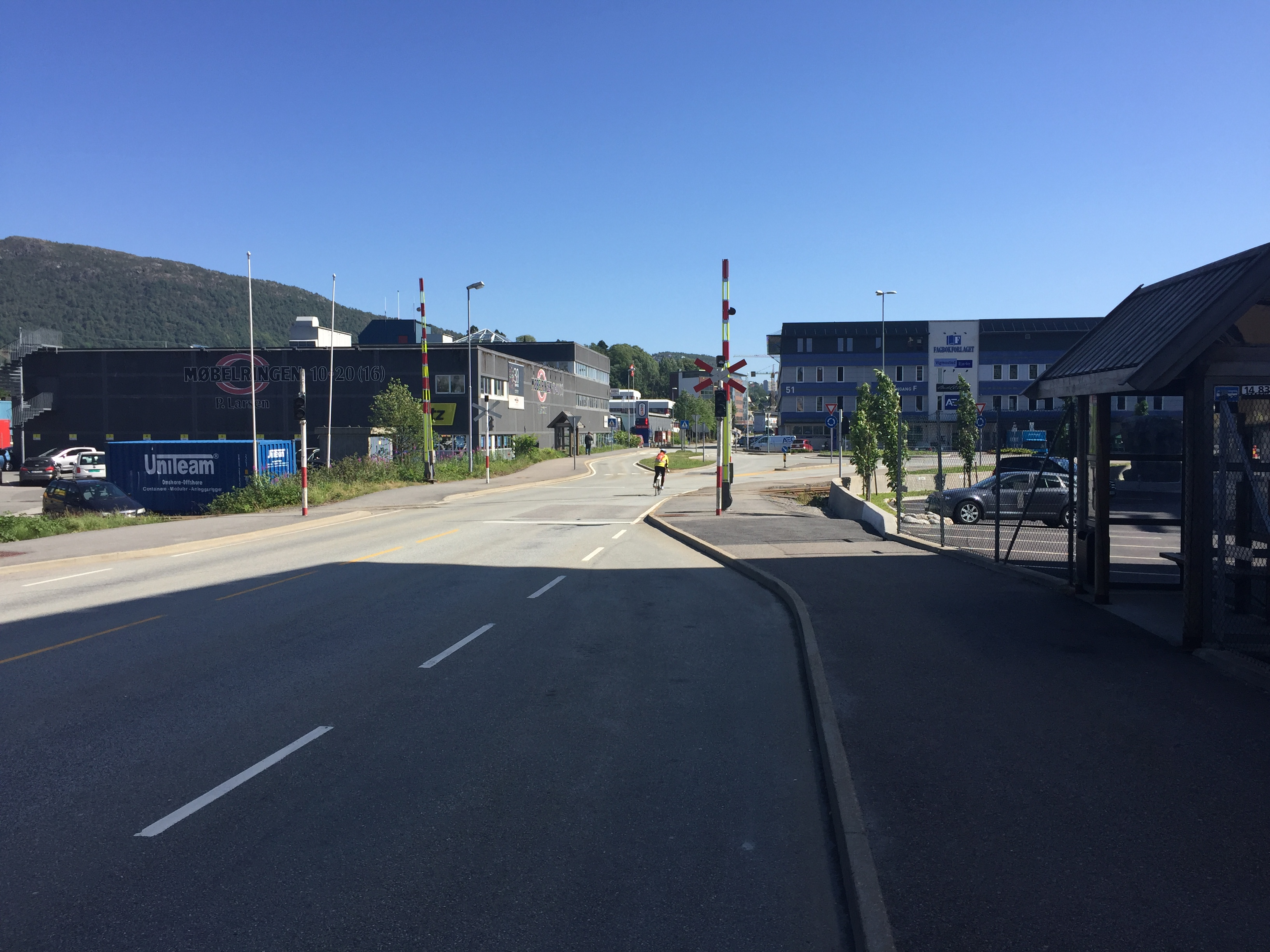 Vossebanen krysser Kanalveien